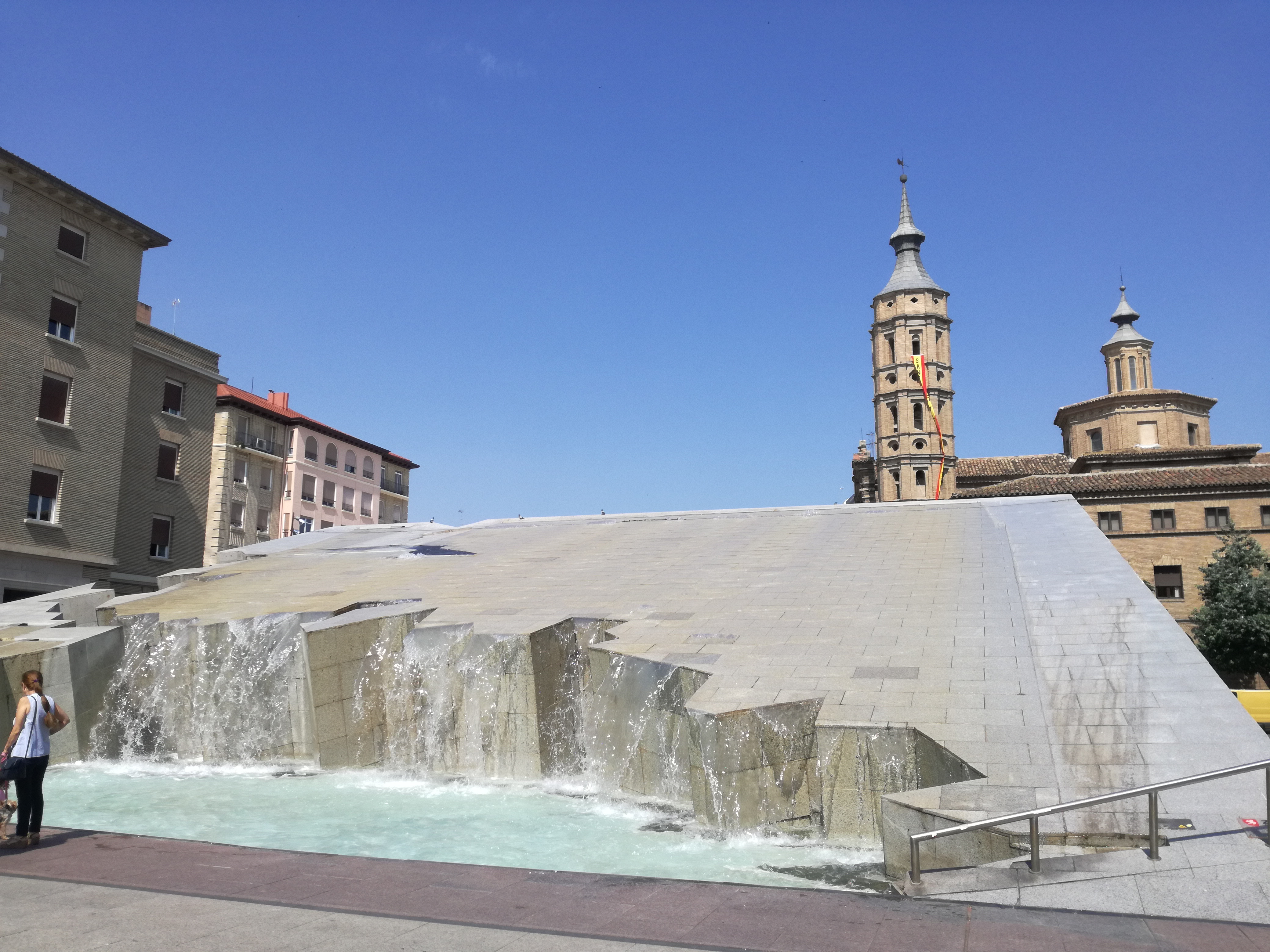 Saragozza fontana e torre pendente della chiesa di san Juan